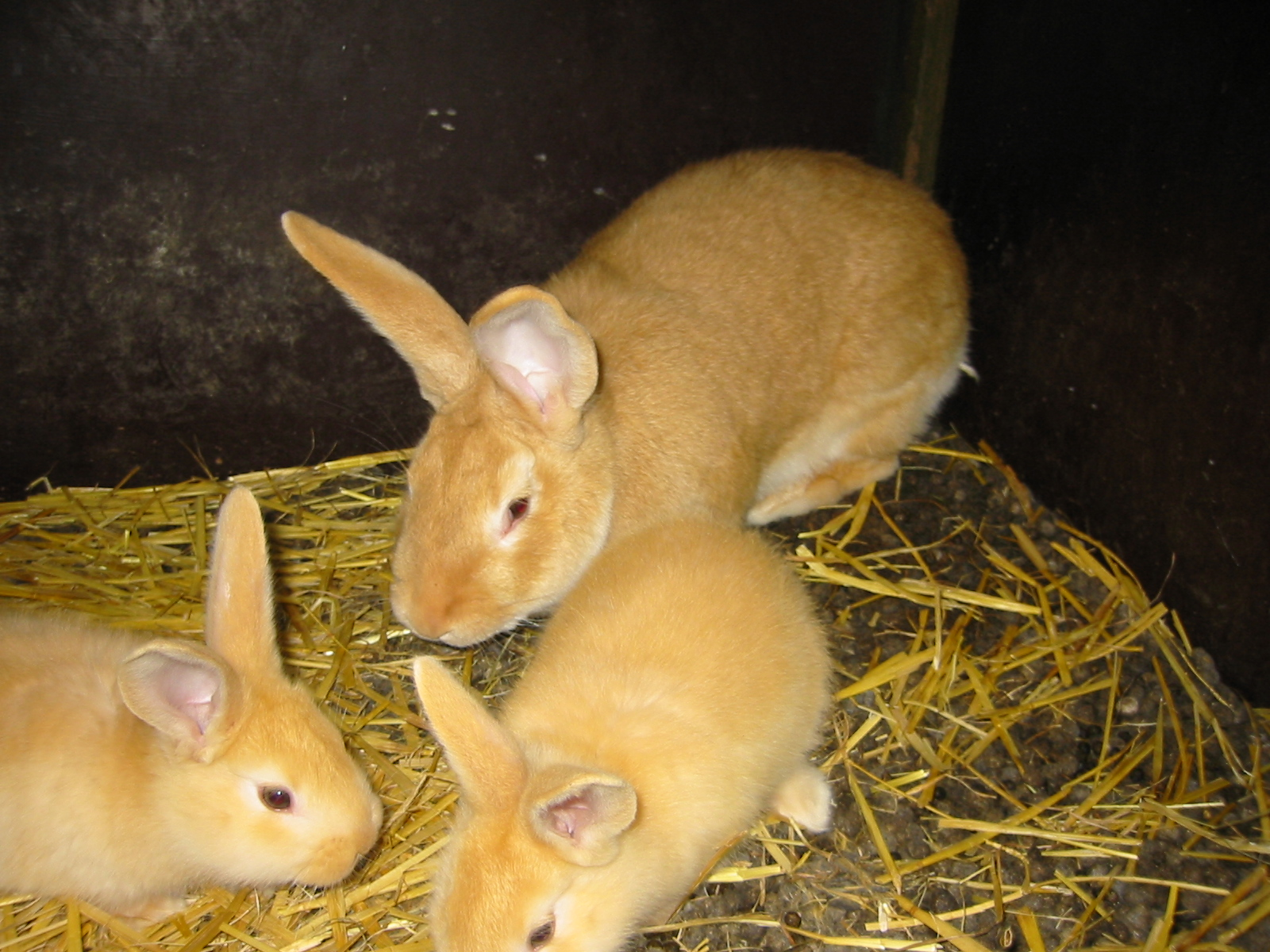 Eigen foto. GerardM 24 apr 2004 06:48 (CEST)